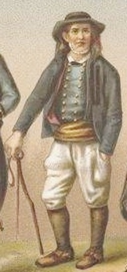 Montagnard des environs de Scaër : chapeau rond à petit bord, veste flottante, double gilet, l'un ouvert et l'autre croisé sur la poitrine. Large ceinture d'étoffe. Braies de toile. Guêtres de drap boutonnées sur le côté.